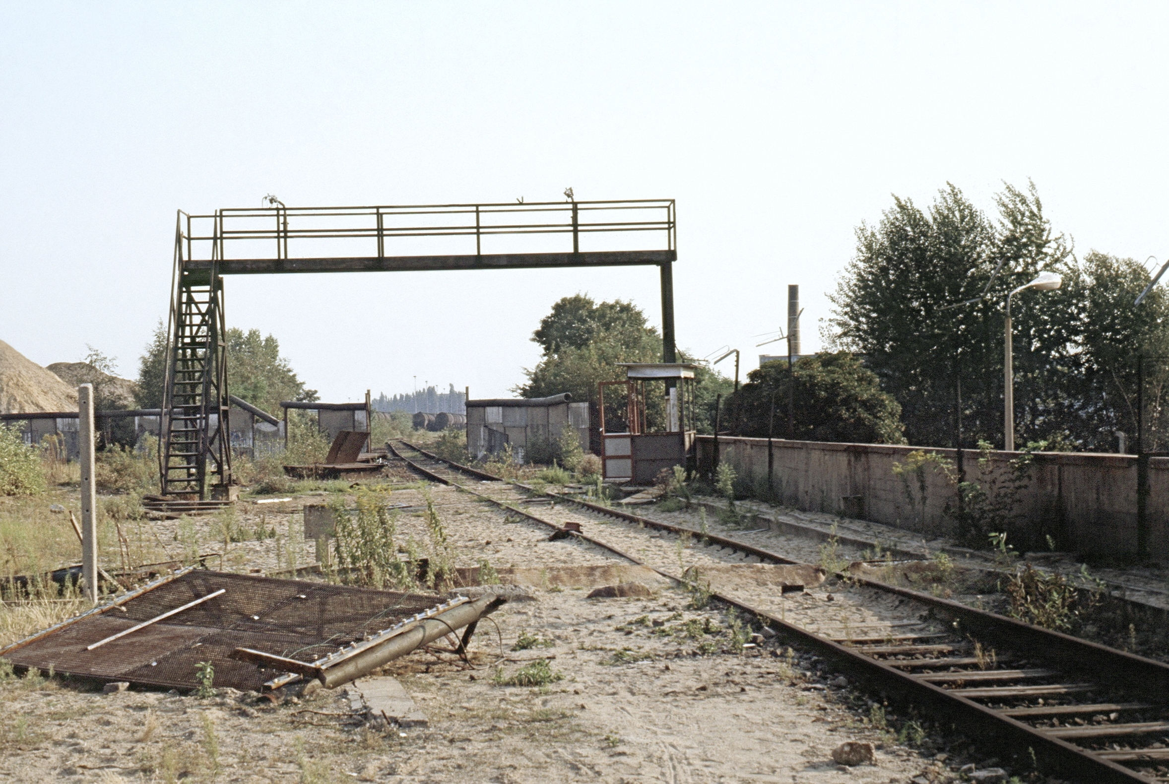 Beschaubrücke in Berlin-Treptow, Blick nach Neukölln.